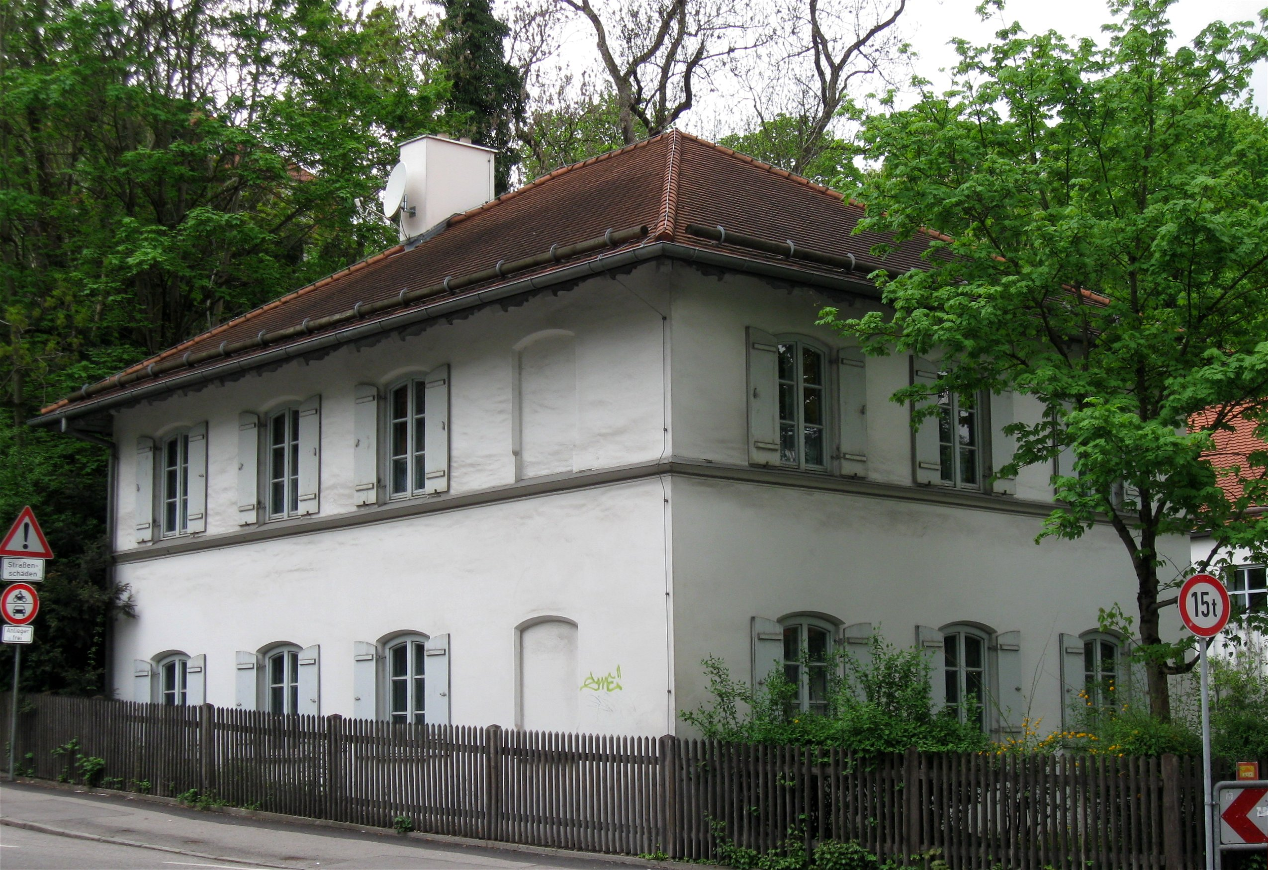 München; Münchener Straße 28; Ehem. Schule, von 1902-27 Pfarrhaus, erbaut 1845-46